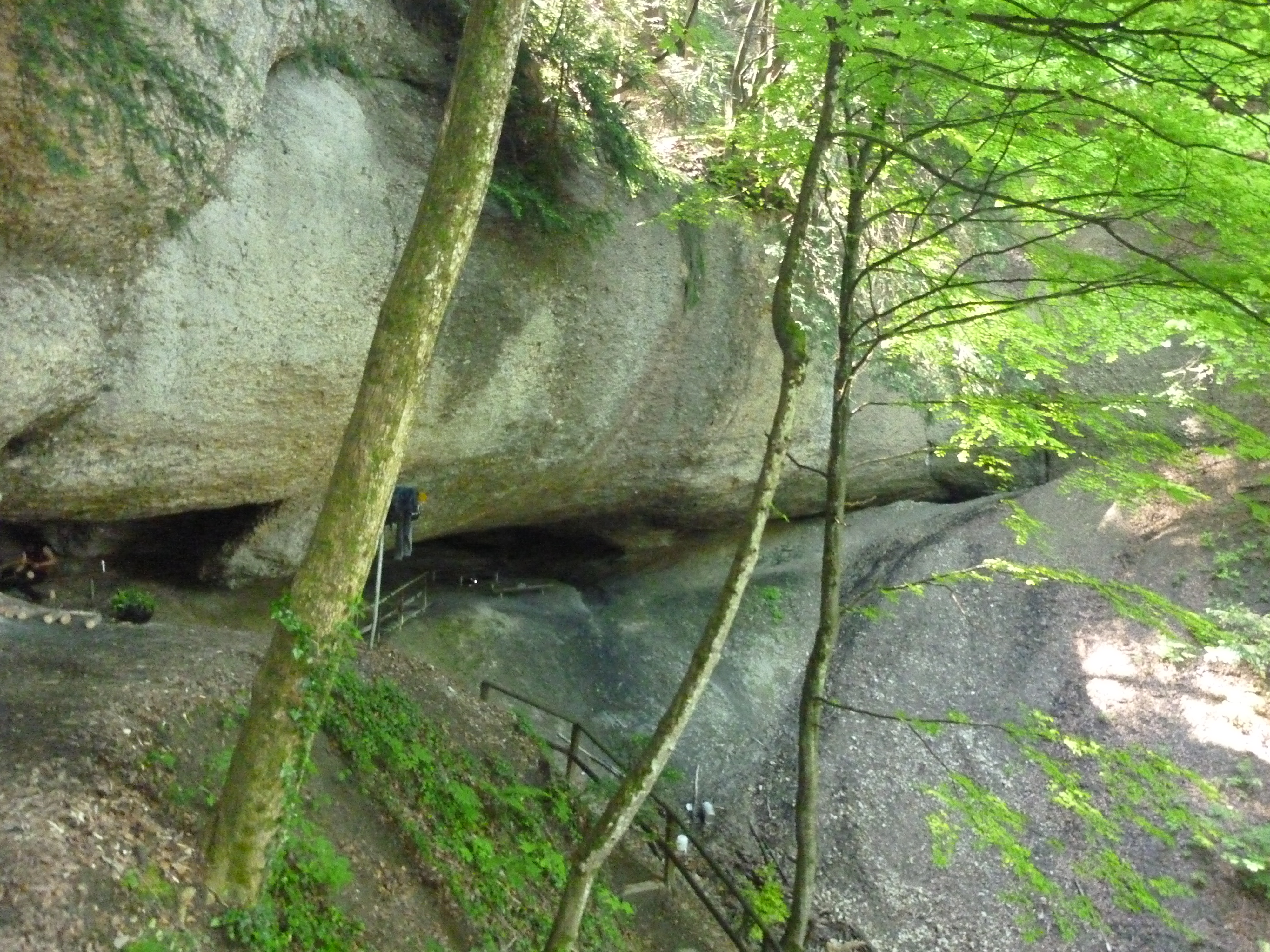 Täuferhöhle Täuferhöhle